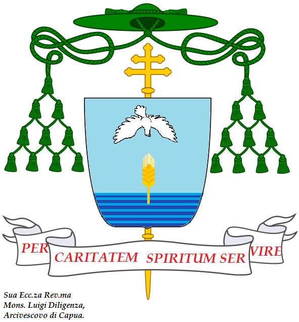 Stemma episcopale